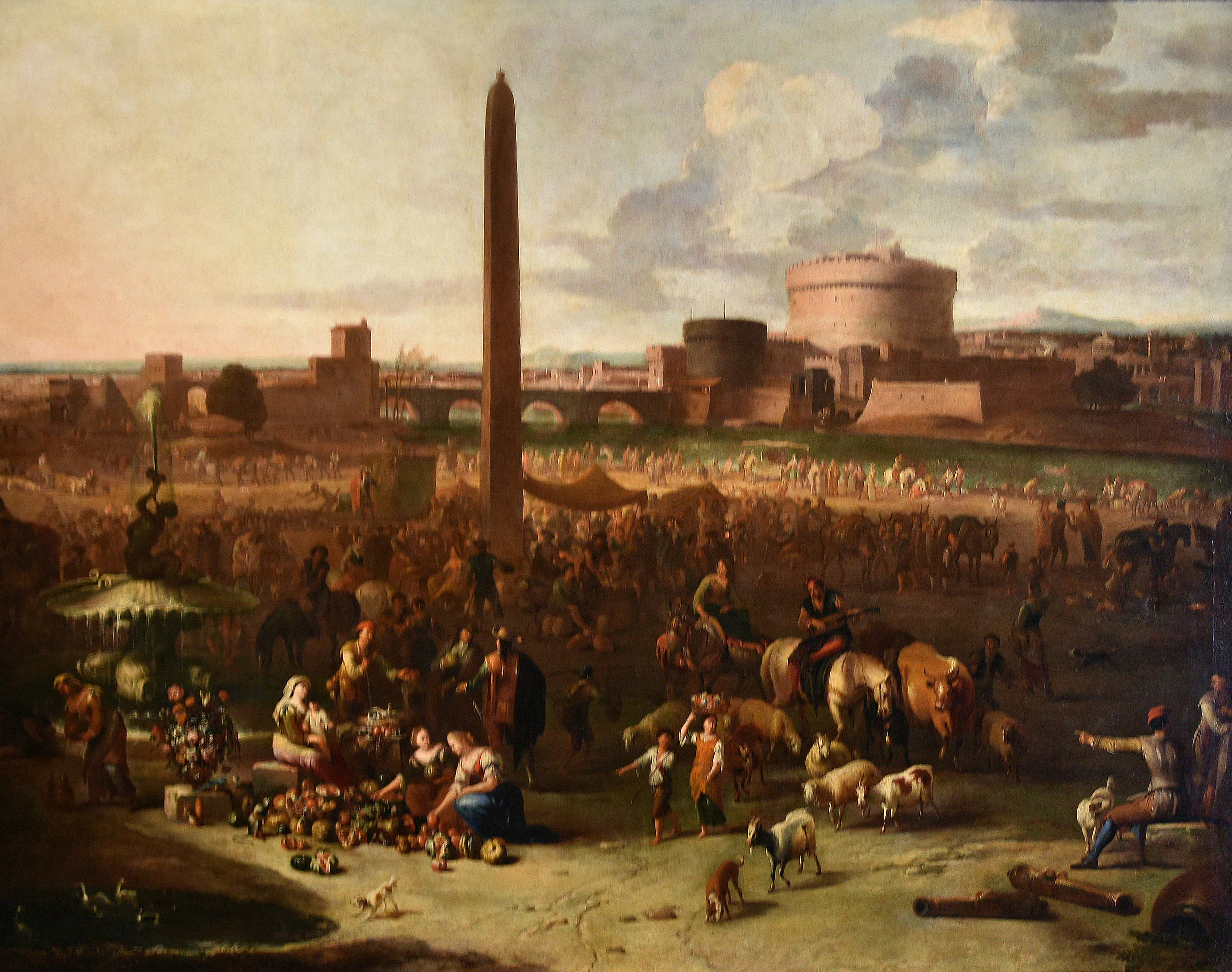 Peeter van Bredael (1629-1719) Markt bij de Engelenbrug in Rome - Noordbrabants Museum 's-Hertogenbosch